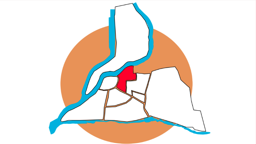 Emplacement du Quartier Nord sur la carte d'Avignon.